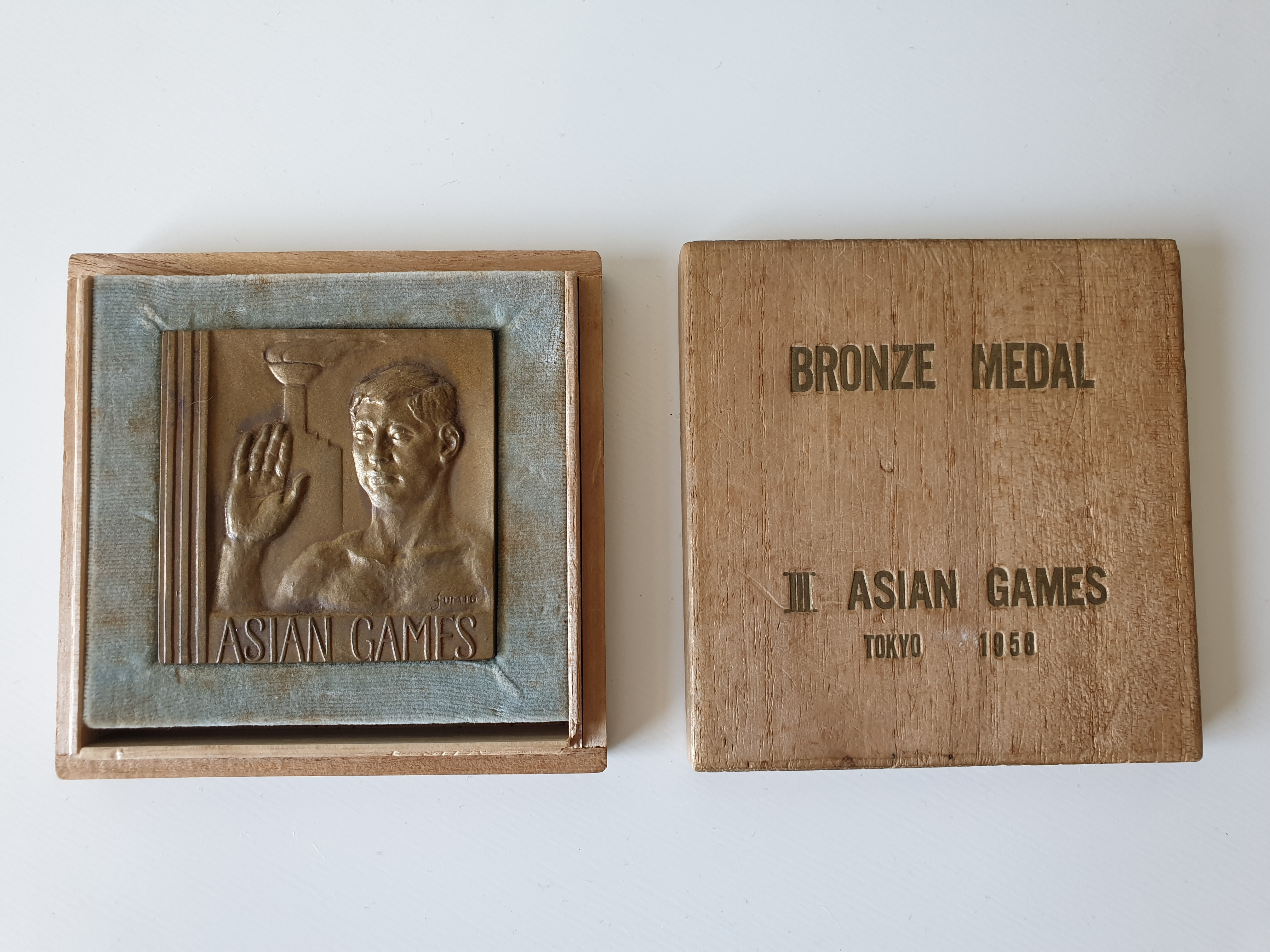 ברוך פינברג - מדלית הארד טוקיו 1958